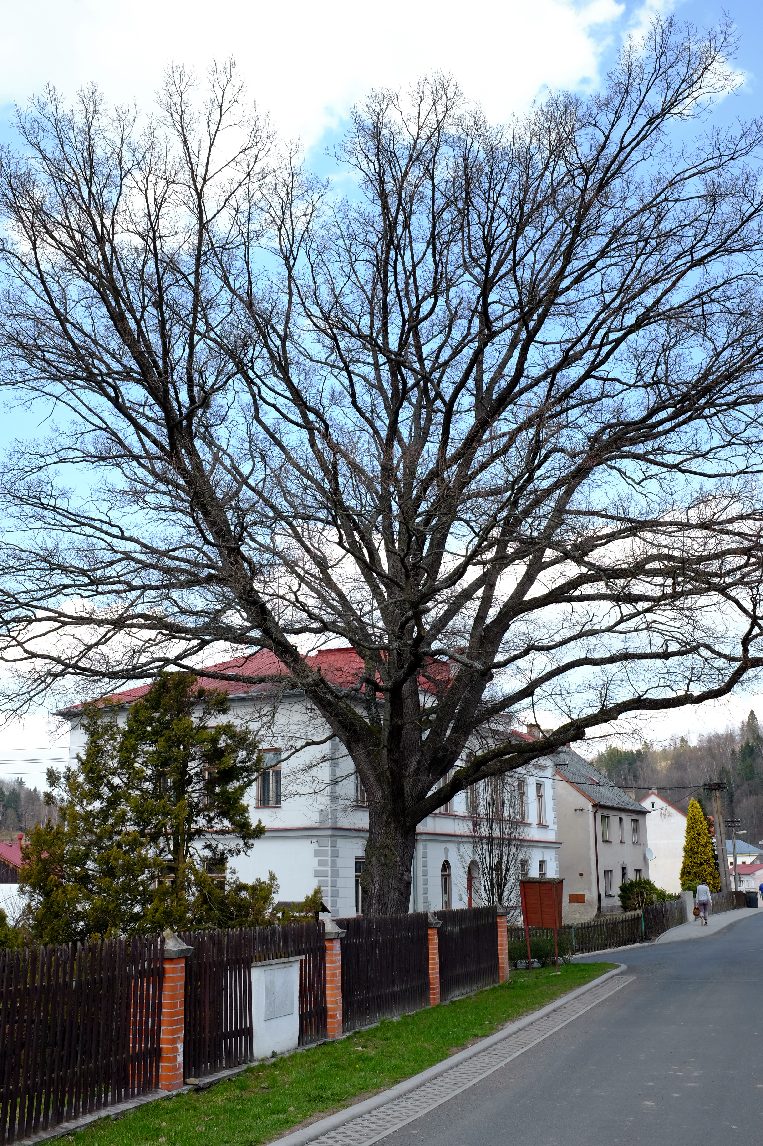 Památný strom - Dub u hudební školy - Bečov nad Teplou, okres Karlovy Vary